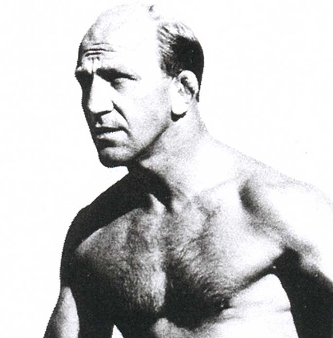 Olle Anderberg